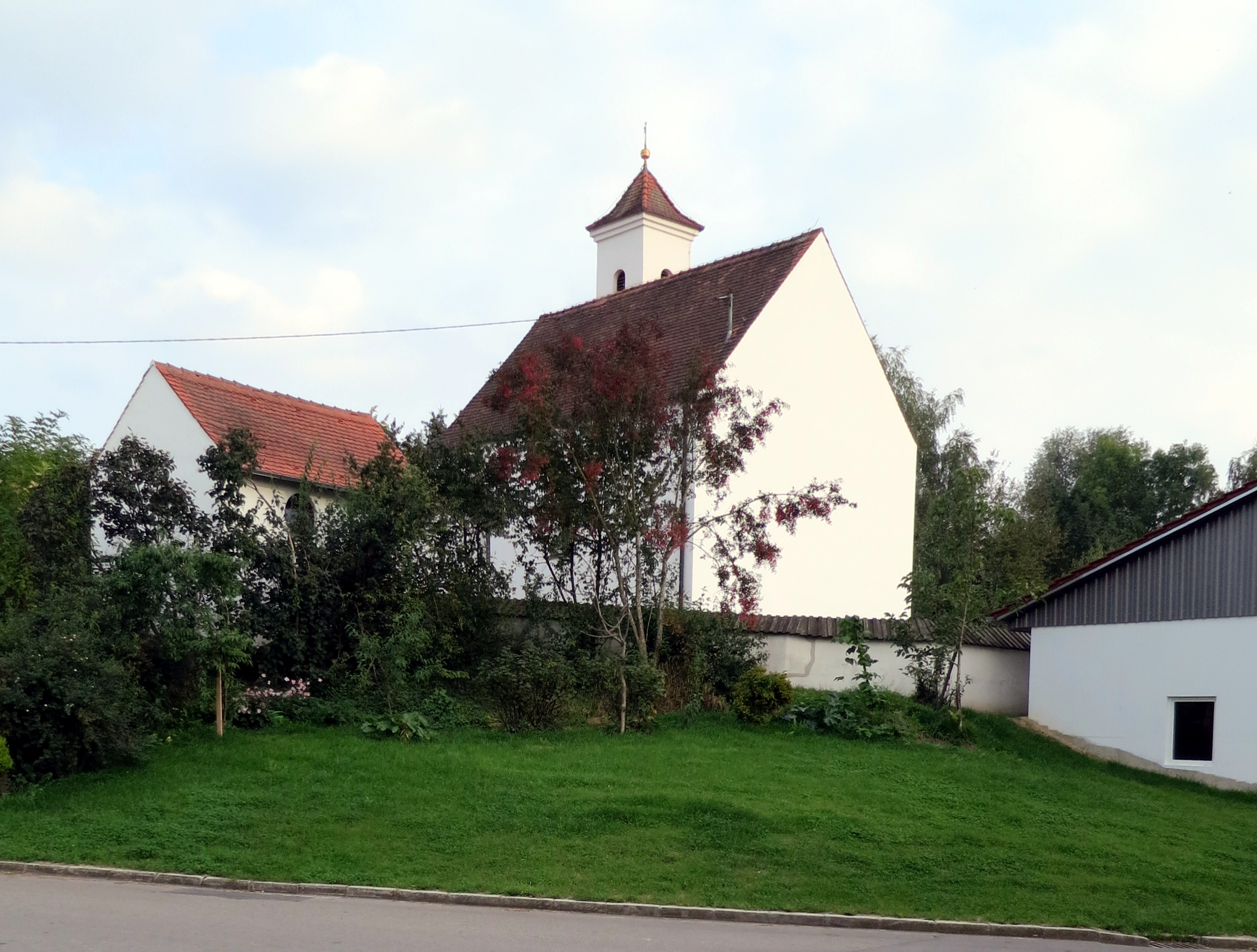 Die Kirche St. Laurentius in Pfaffenhofen, Ansicht aus NordWest